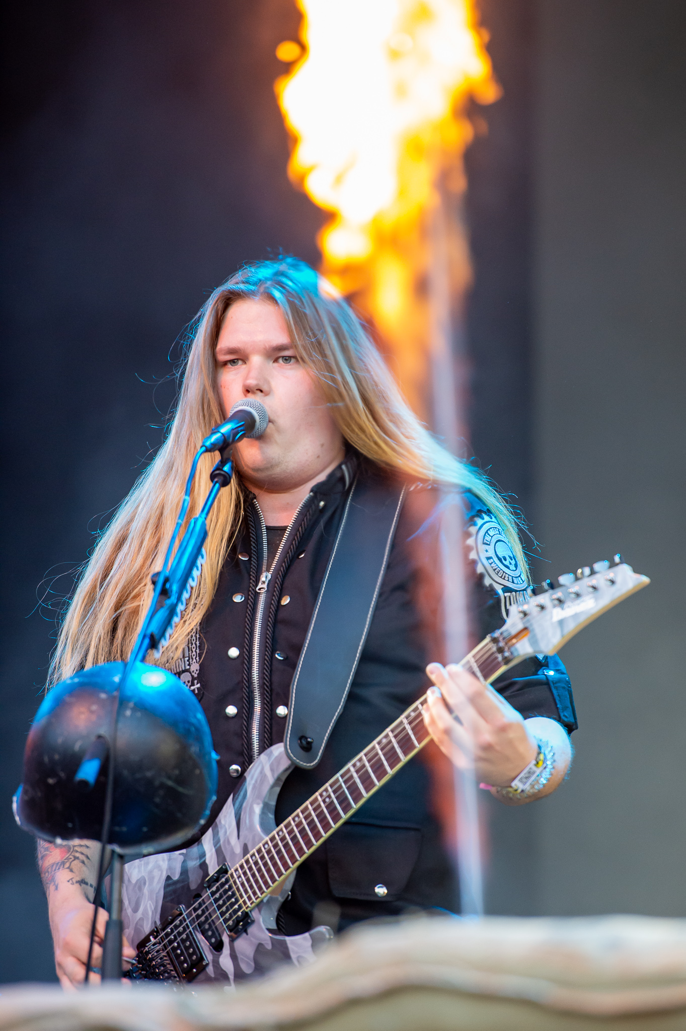 ARGO-Konzerte,Beck's Park Stage,Konzert,Livekonzert,Livemusik,Musik,RiP,Rock im Park 2019,Sabaton,Tommy Johansson